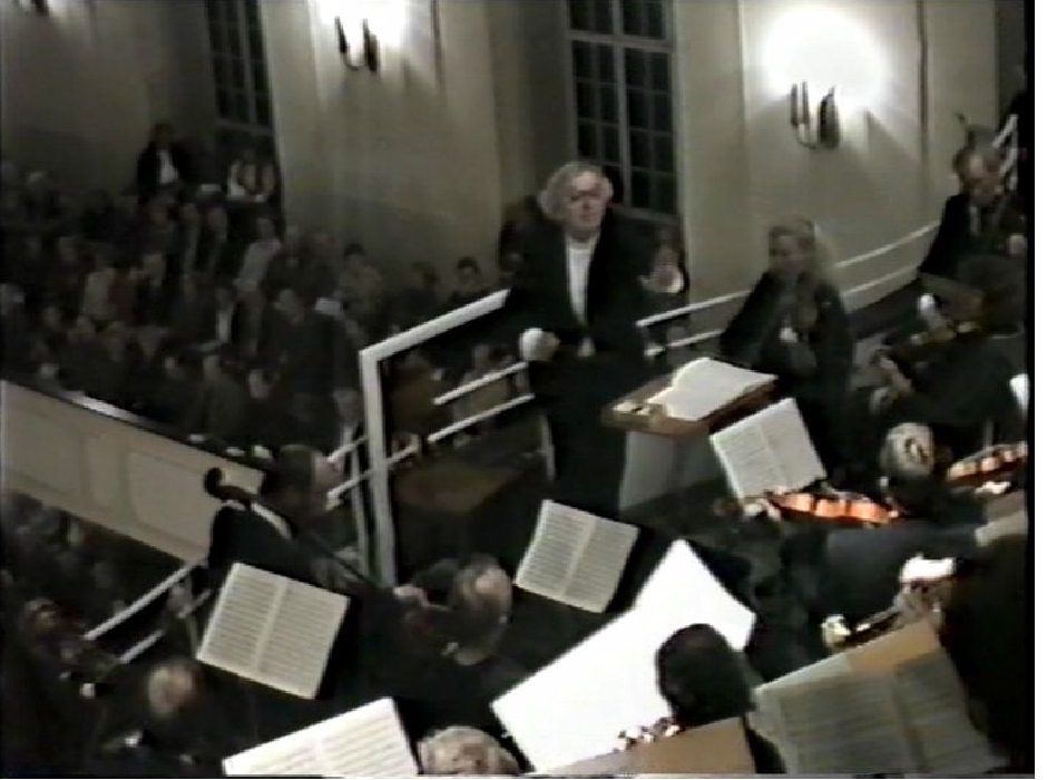 Brahms-Aufführung -W.Pesch